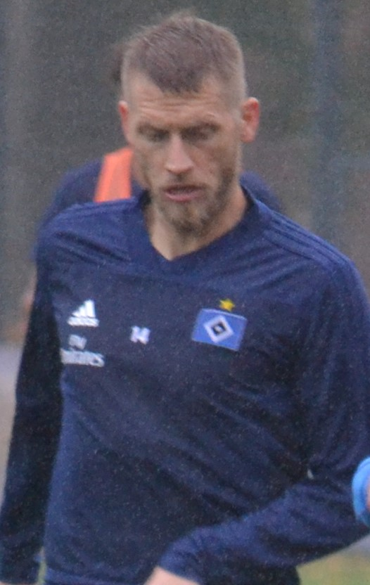 Aaron Hunt beim Training des Hamburger SV am 18. Oktober 2018.